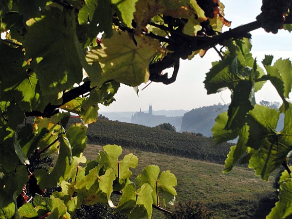 Titel: Elbweindörfer (Original text: Blick von einem Weinberg bei Zadel (eines der Elbweindörfer, auf die Silhouette von Meißen mit Dom und Albrechtsburg.)